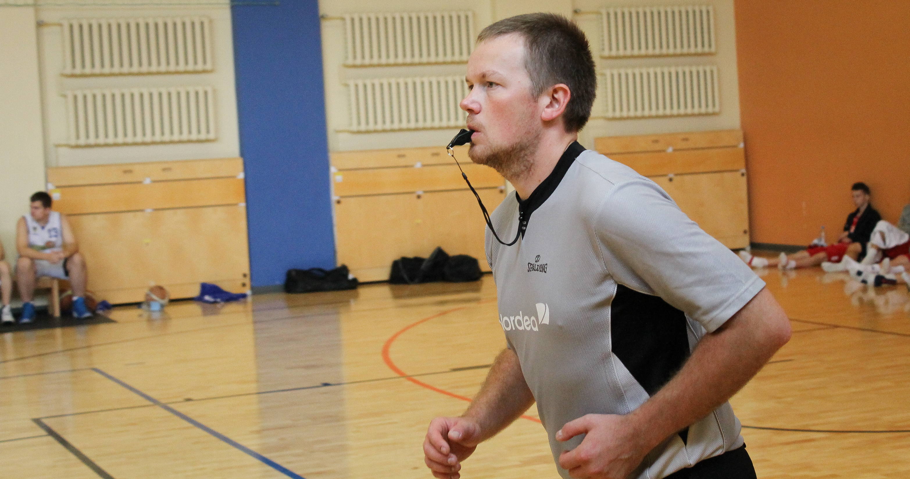 New Generation Mini Cup Kadrinas